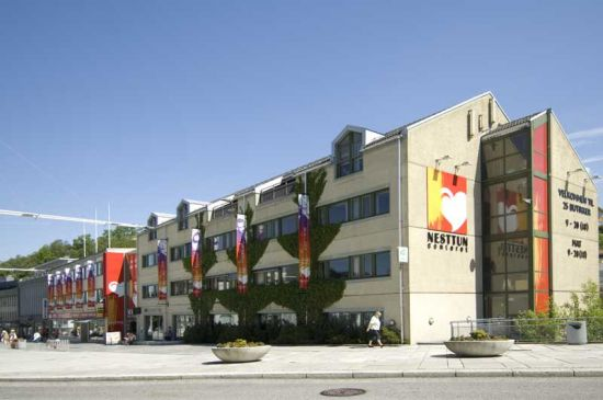 Nesttun senter, Nesttun. Sett fra sør-vest.